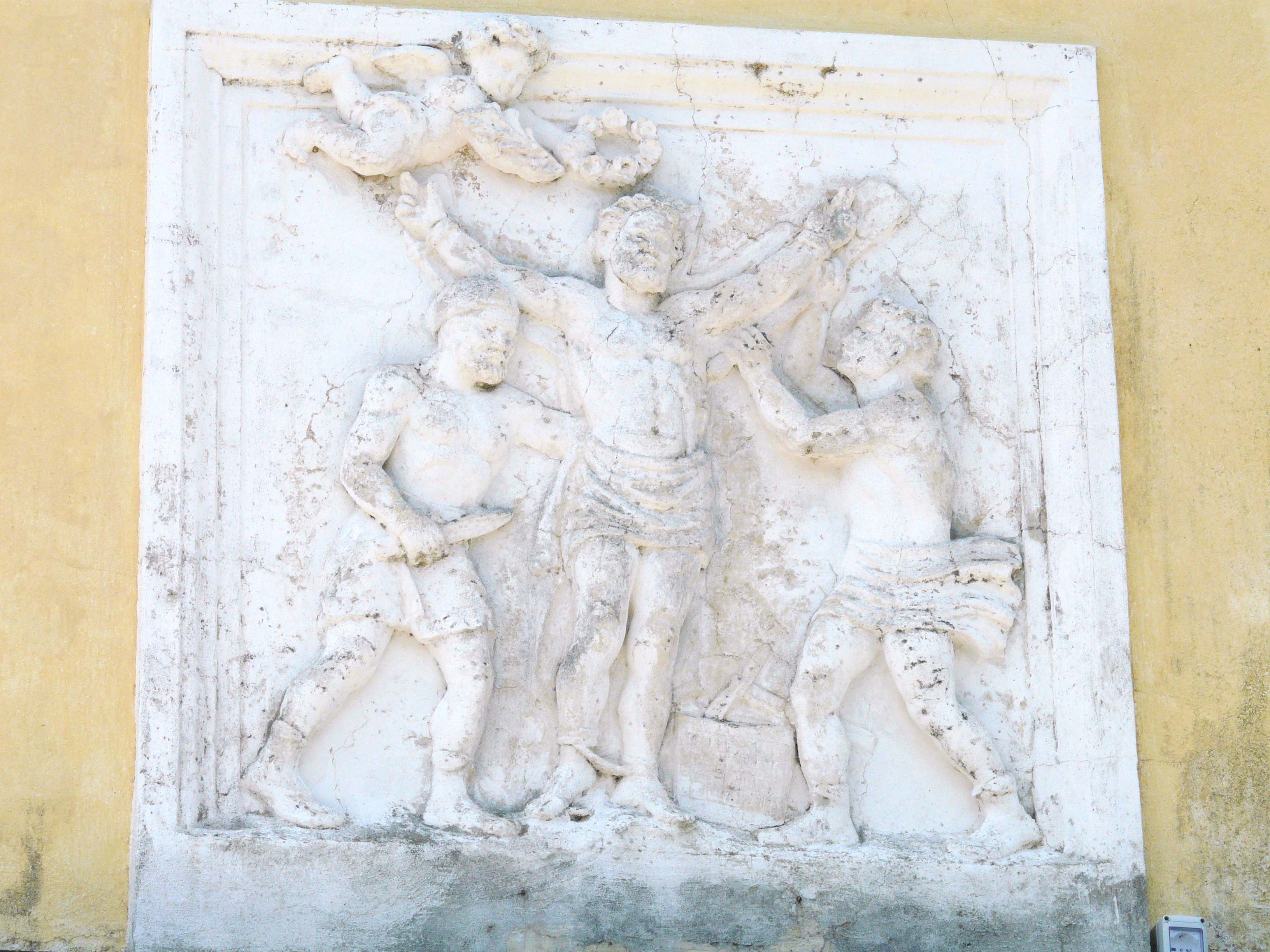 La chiesa di San Bartolomeo di Serra, Cicagna, Liguria, Italia